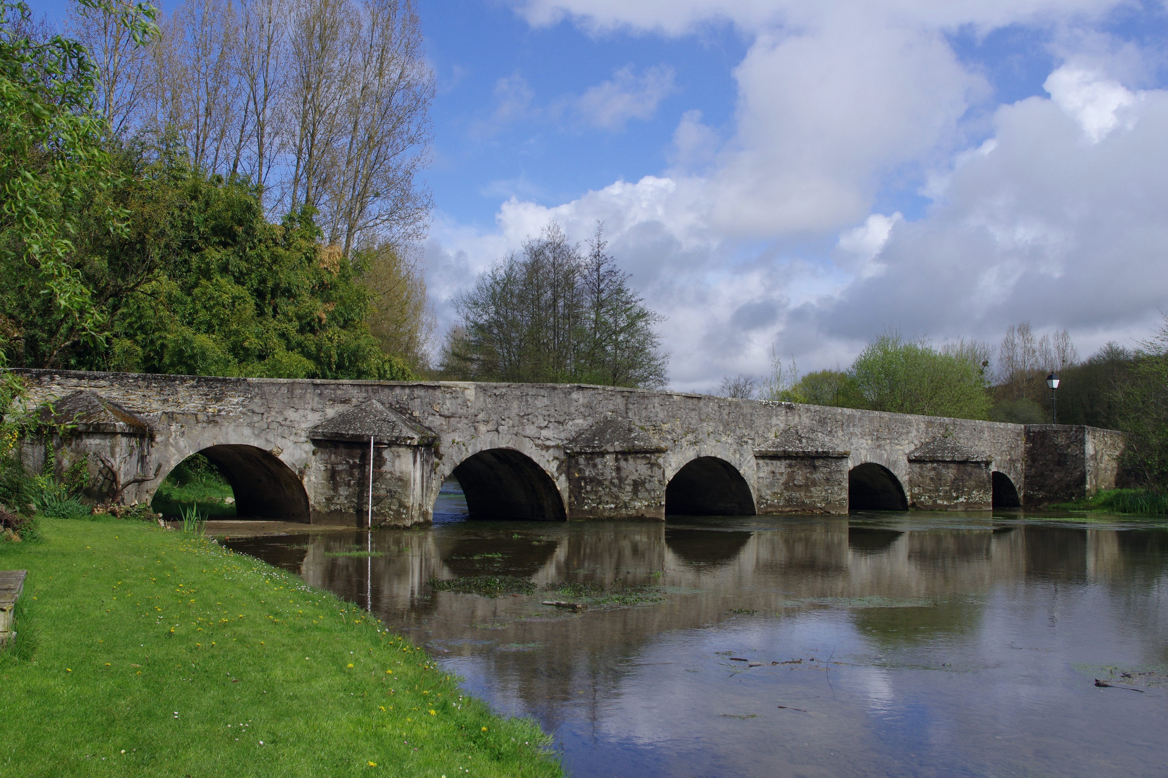 Pont de la Millière sur le Clain, commune de Romagne, Vienne, France. 2012-04-19 Romagne(Vienne)